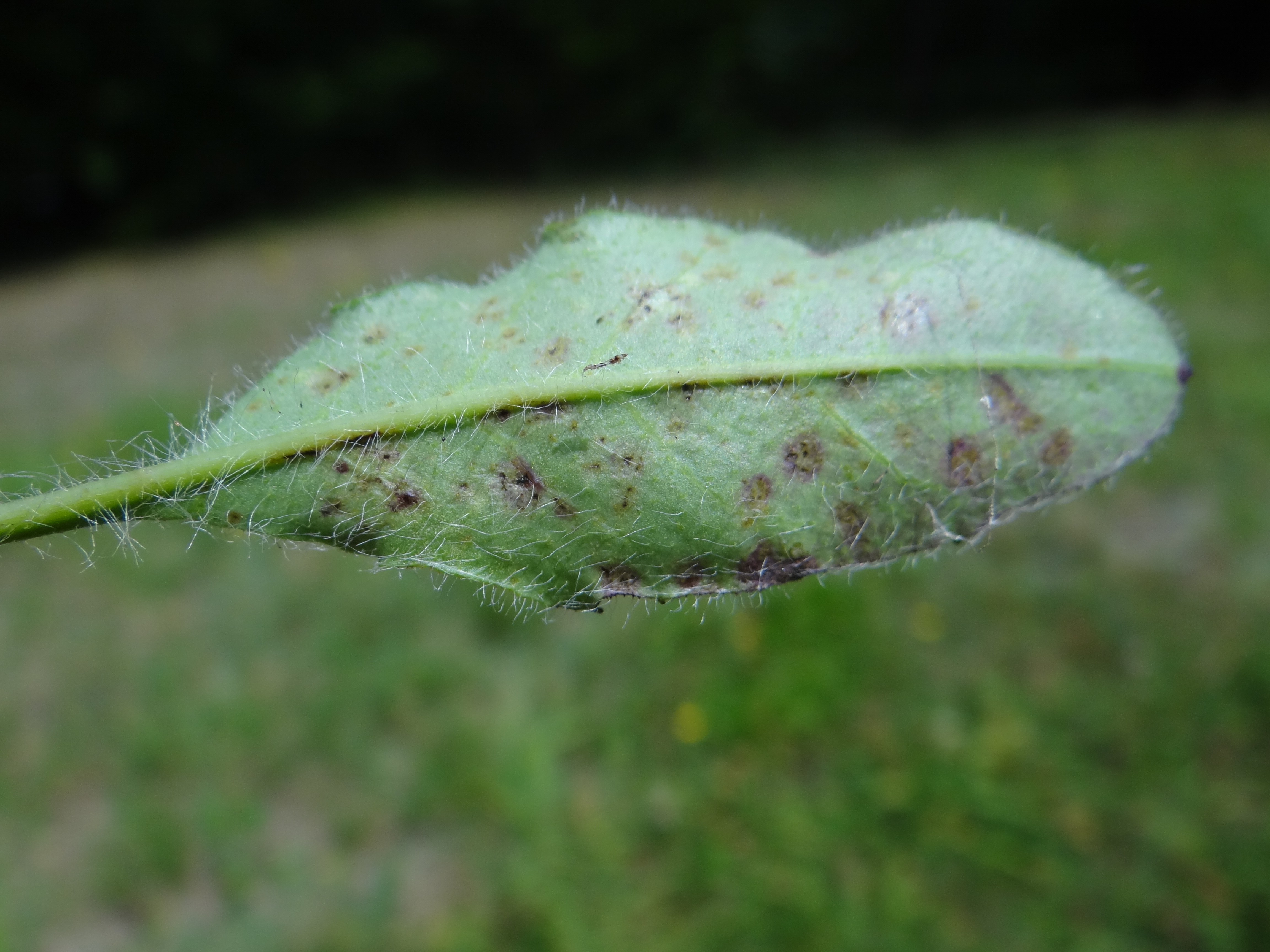 Ramularia taraxaci on leaf Hieracium sp.